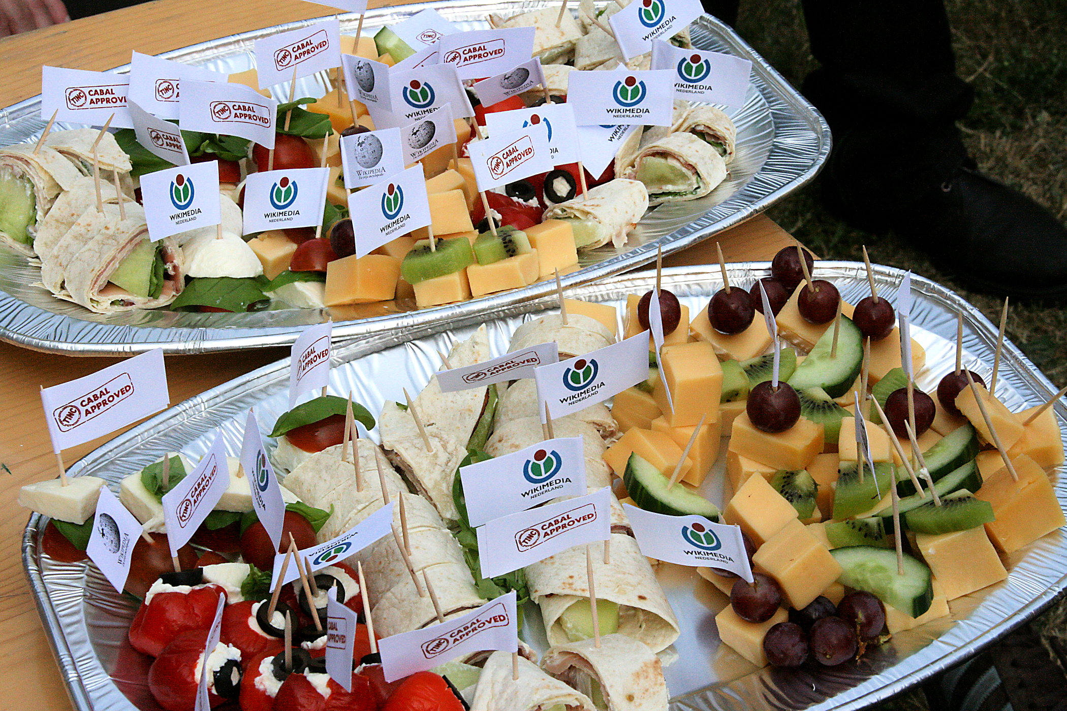 Wiki snacks